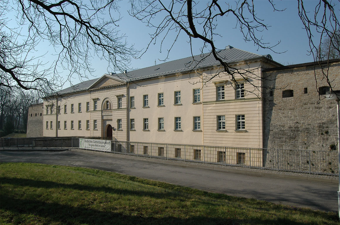 Vorderseite der Defensionskaserne (errichtet zwischen 1825 und 1826)